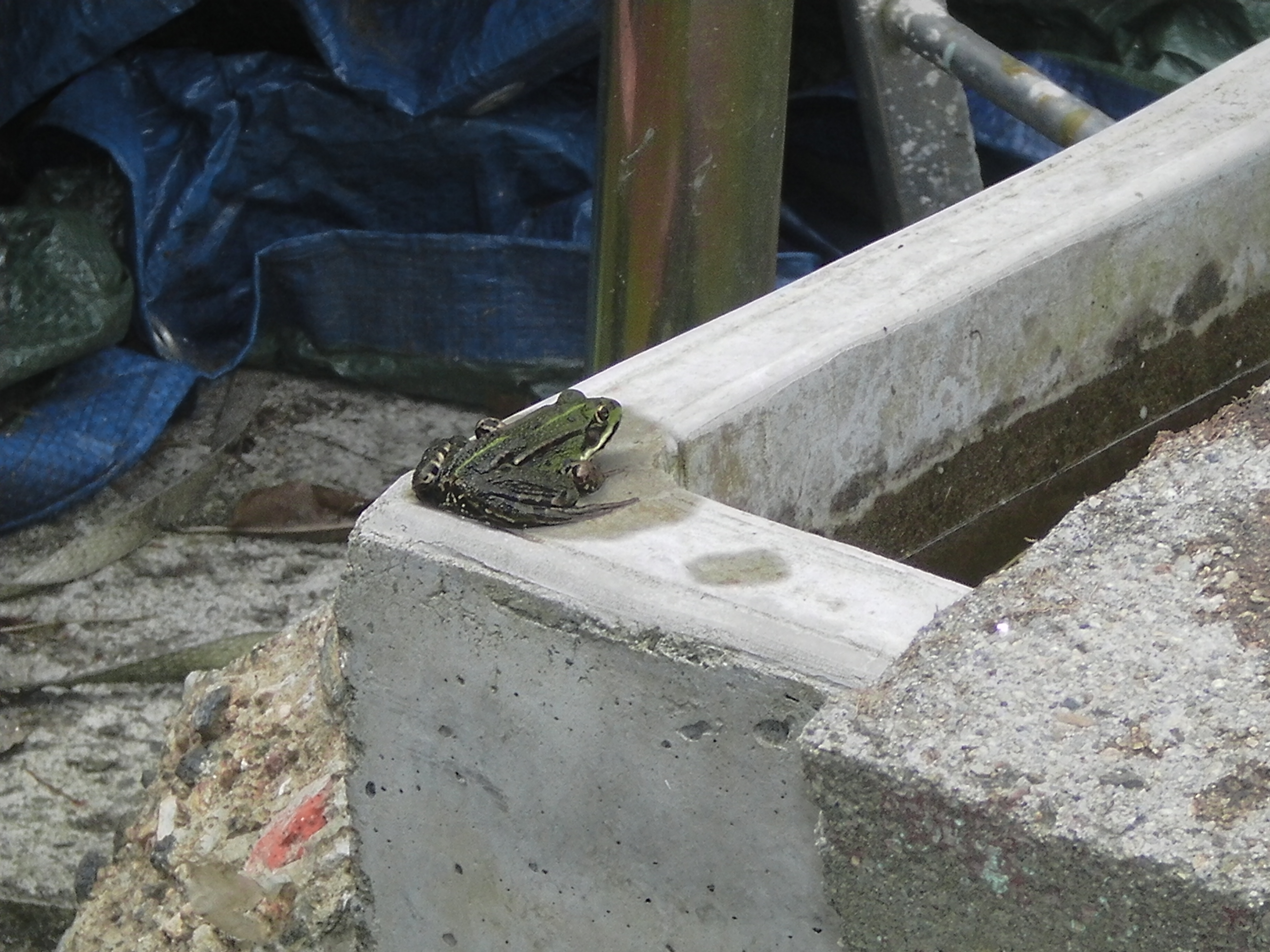 grenouille au bord d'un lavoir en béton qui lui sert de mare